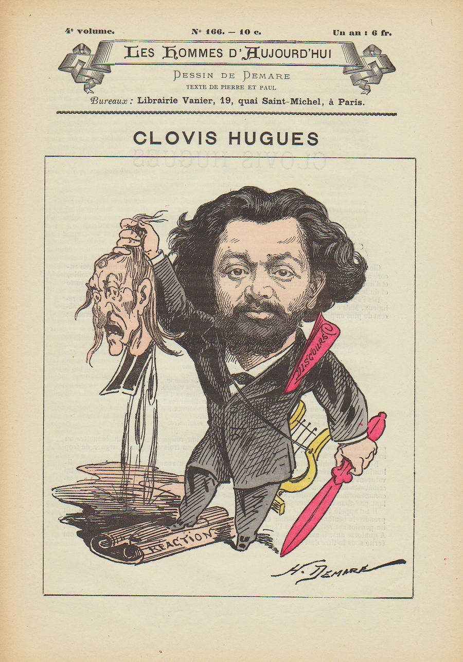 Les Hommes d'aujourd'hui, n°166 (vers 1881). Caricature de Hubert Hugues Clovis, dit Clovis Hugues, par Henri Demare. Scan exemplaire personnel.